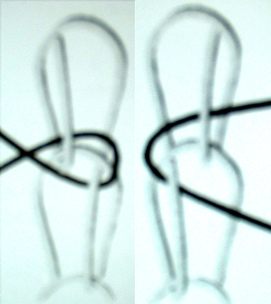 Geschlossener (links) und offener (rechts) Henkel im Kettengewirk